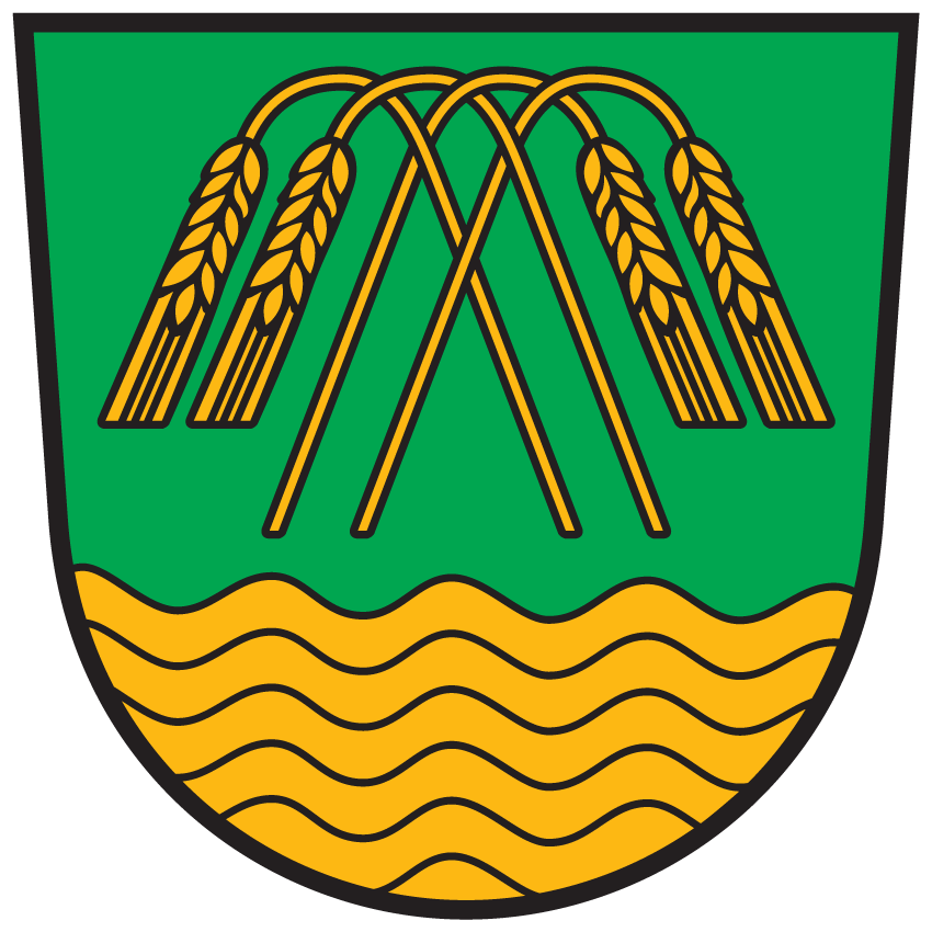 Wappen von Feld am See